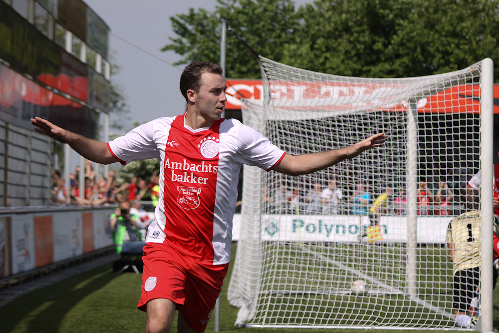 Kwong-Wah Steinraht (Amsterdam, 1 september 1982) is een voormalig profvoetballer van HFC Haarlem